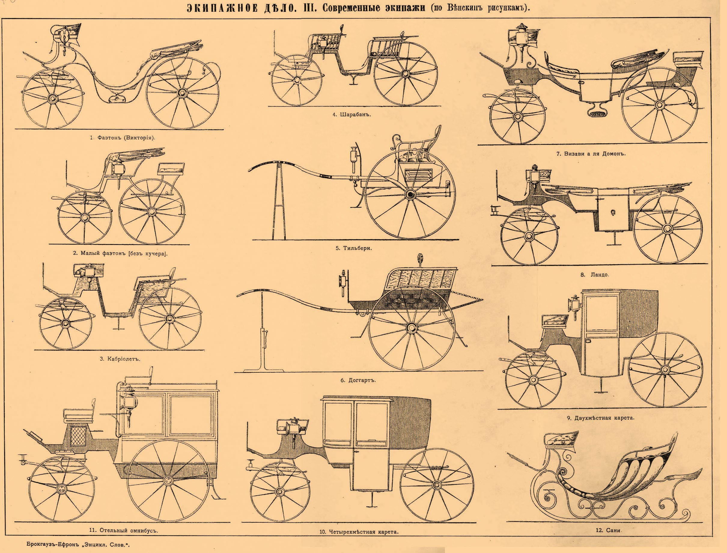 Иллюстрация к статье Экипажное дело из энциклопедии Брокгауза и Ефрона